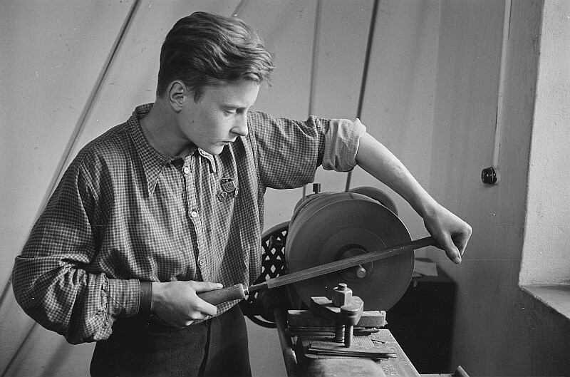 Original image description from the Deutsche Fotothek Jugendlicher Häftling an einer Drehbank